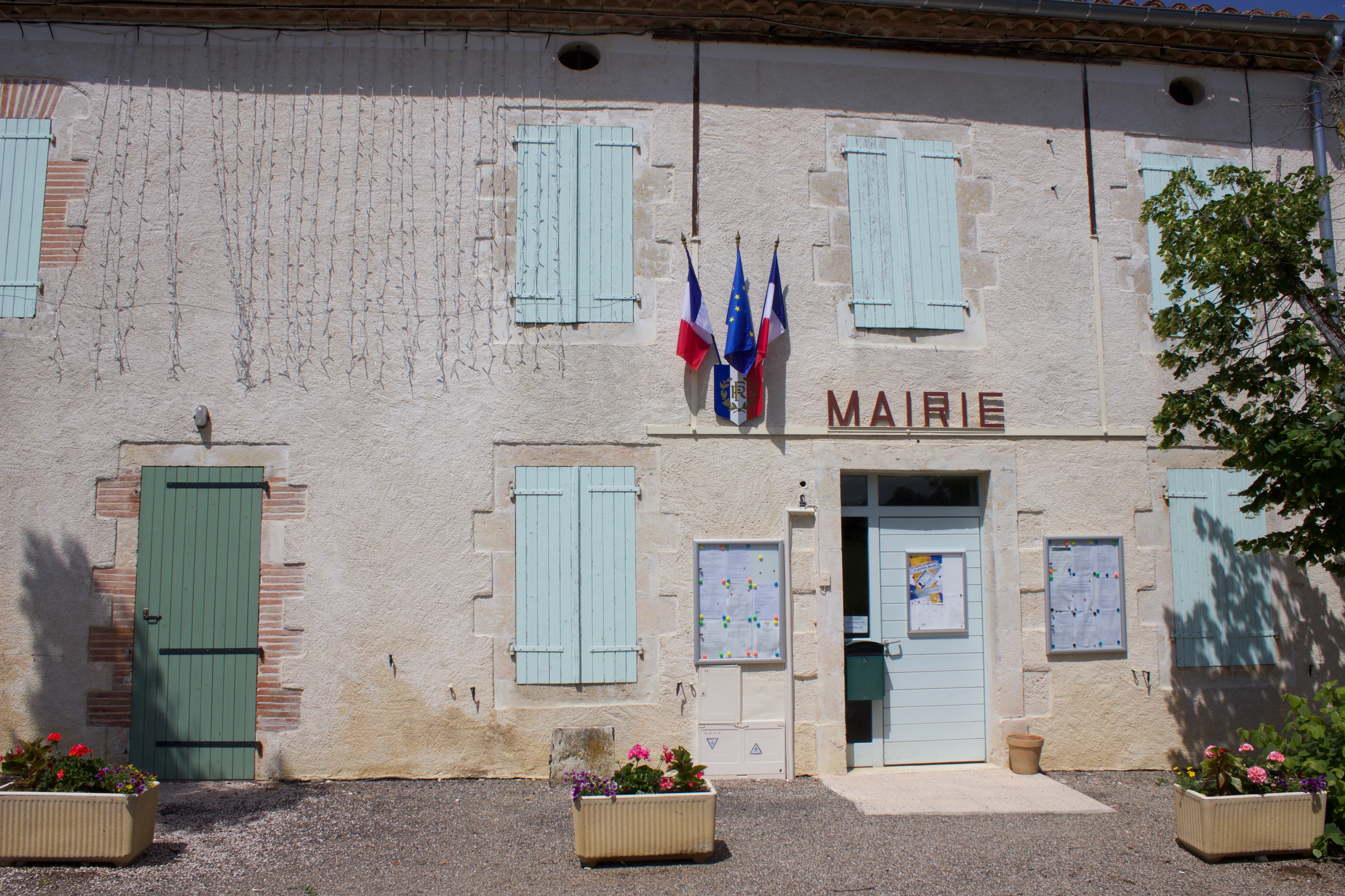 Saint-Antonin (Gers)